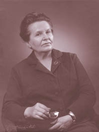 Kerttu Saalasti oli nivalalainen kansanedustaja.